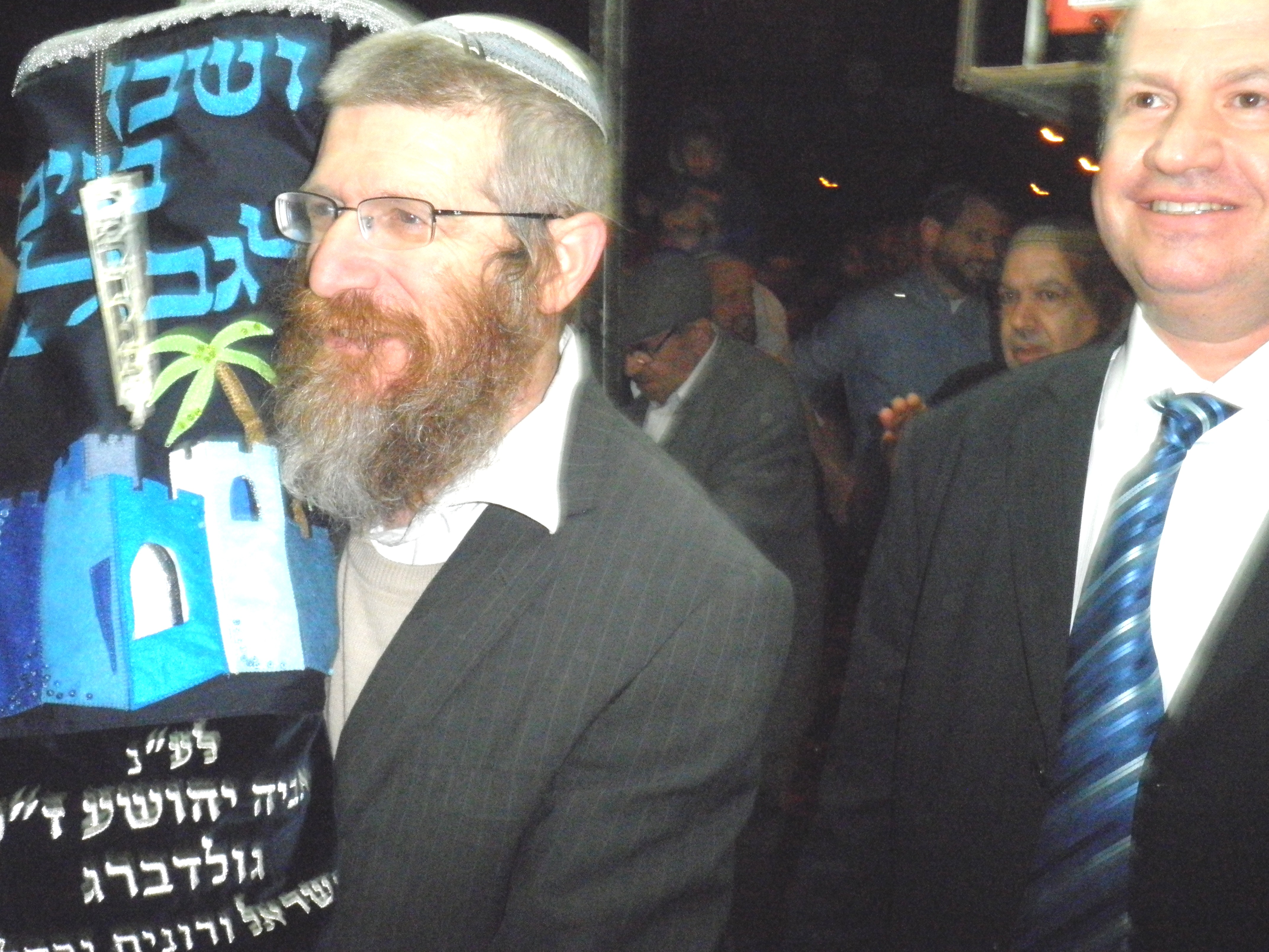 הרב צבי קוסטינר בהכנסת ספר תורה בטקס העלייה לקרקע שבי דרום